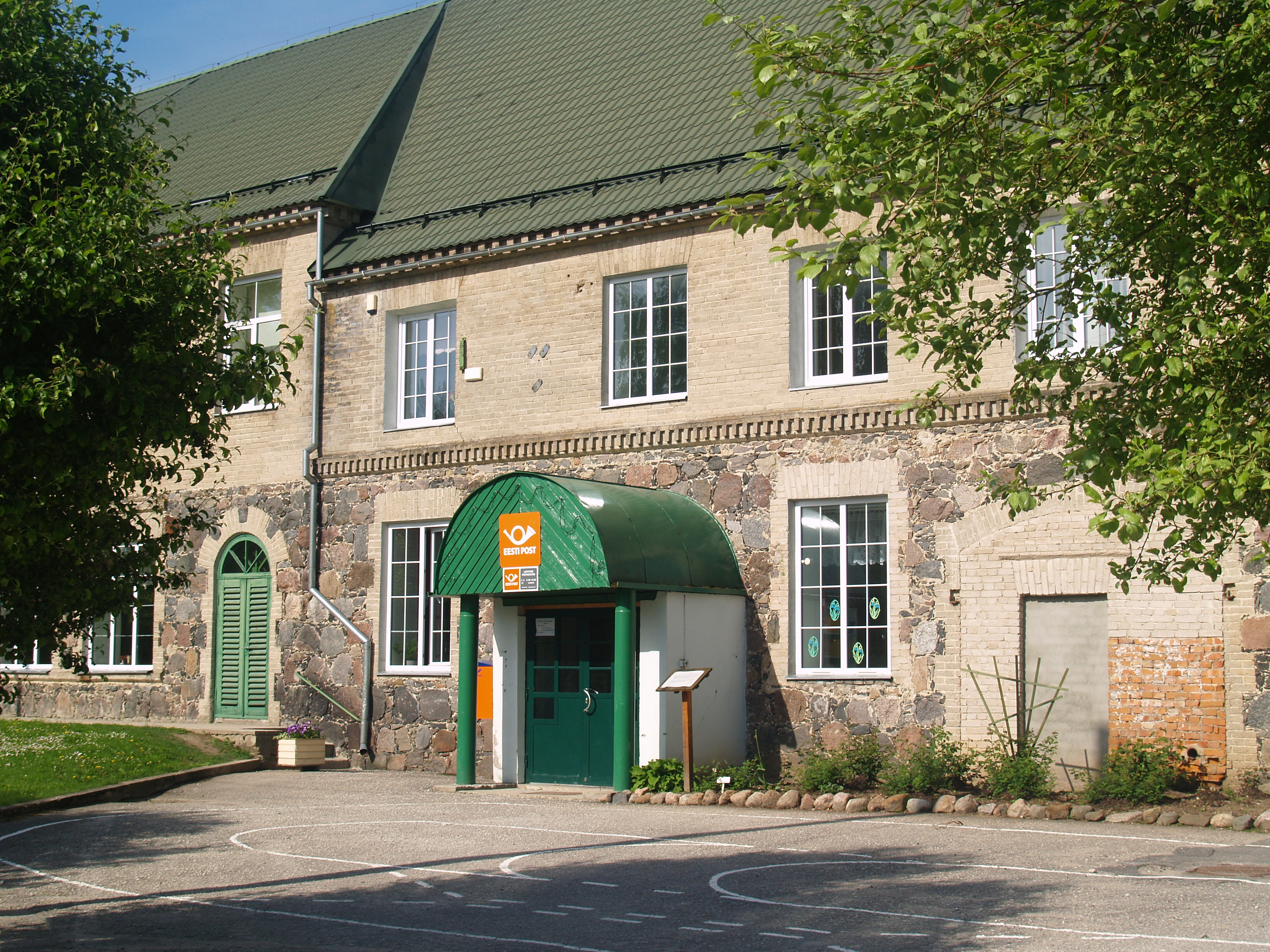 Jõgevamaa fotod